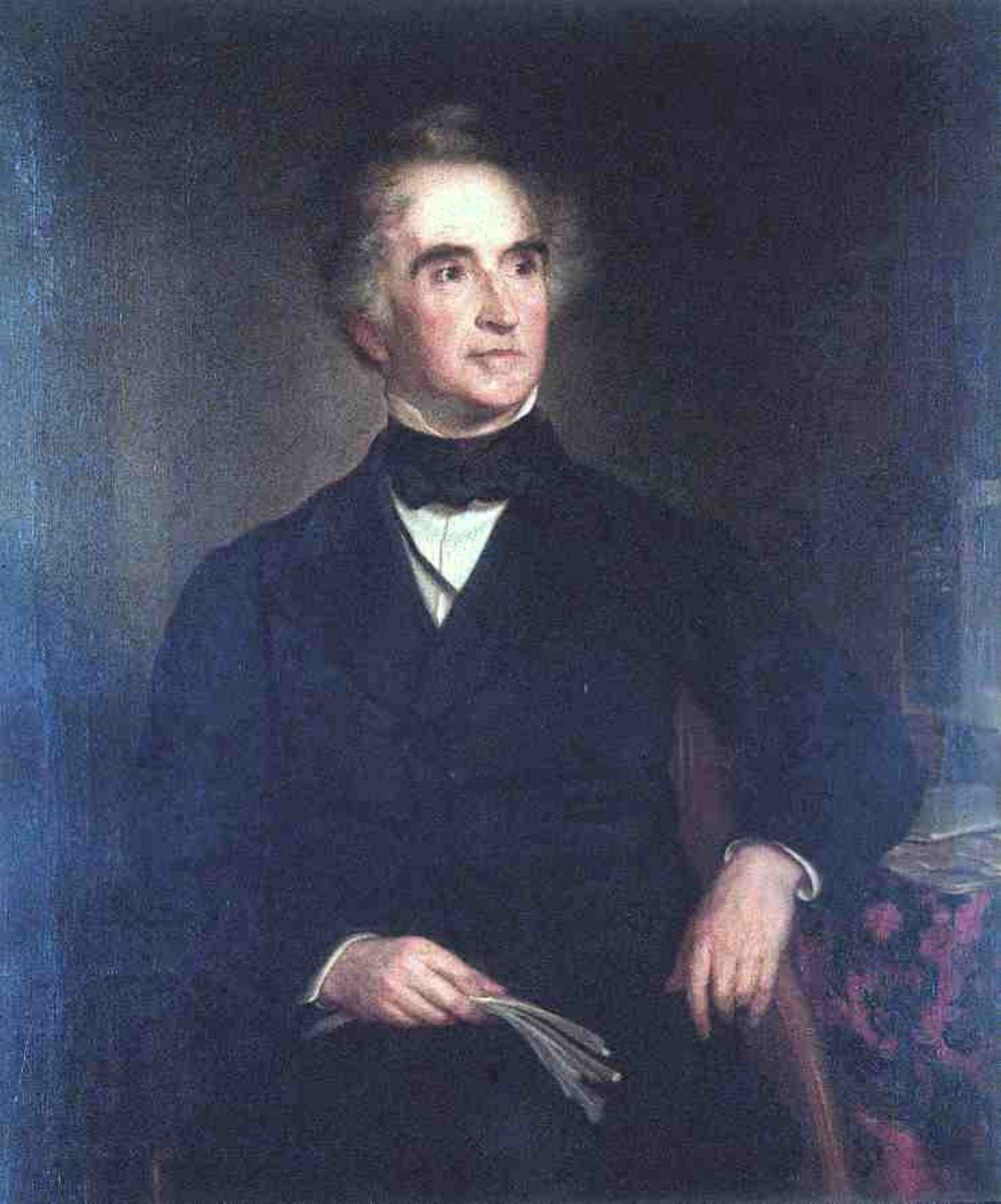 Justus von Liebig (1803-1873), Portrait um 1850